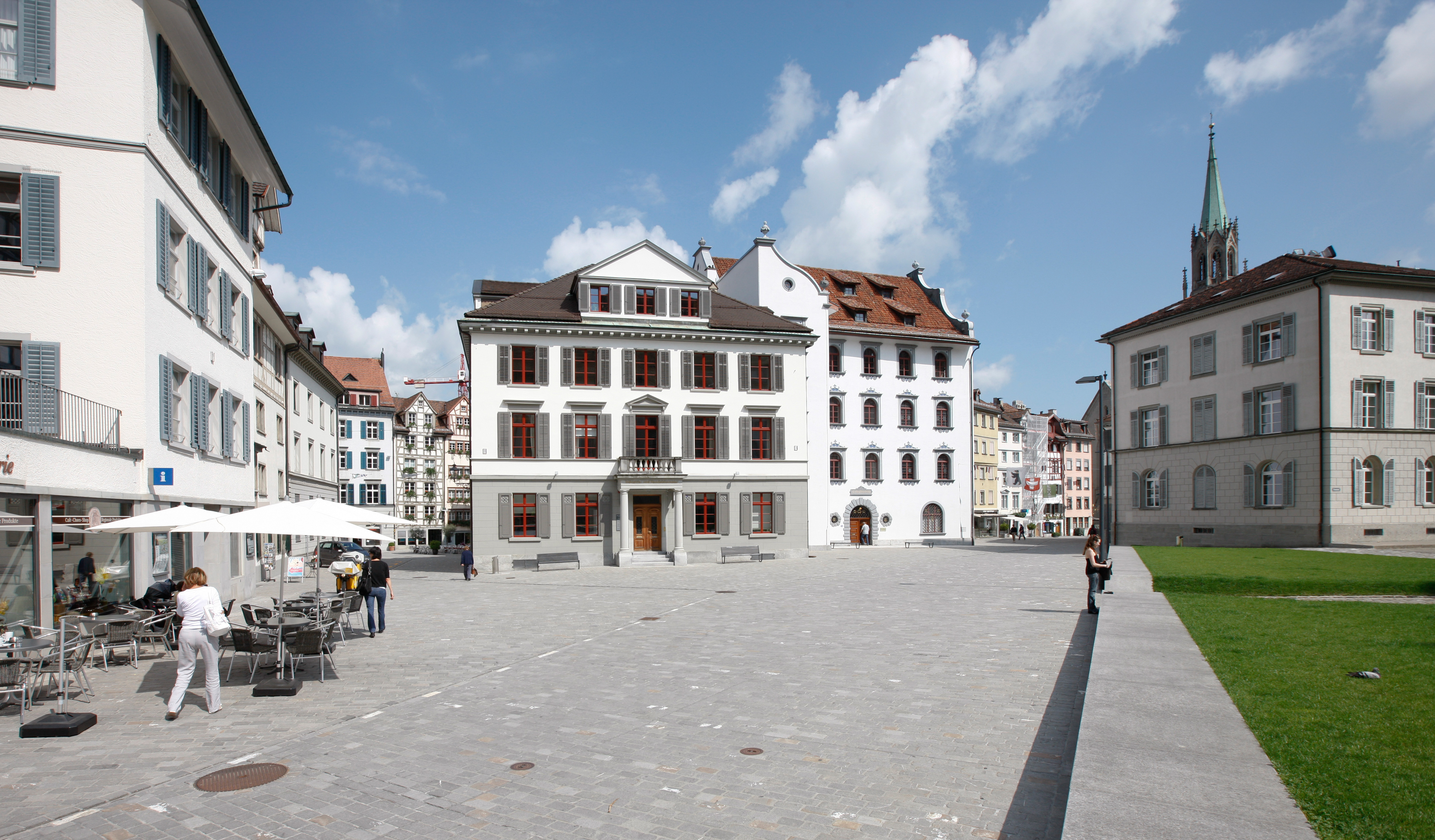 Das Haus "zum Engelskopf" ist seit 1864 Sitz der IHK St.Gallen-Appenzell.